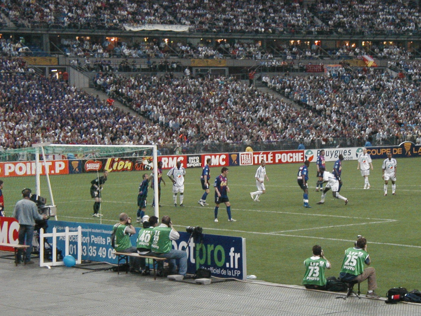 Scène de la finale de la Coupe de la Ligue française de football 2004-2005 entre le SM Caen et le RC Strasbourg.